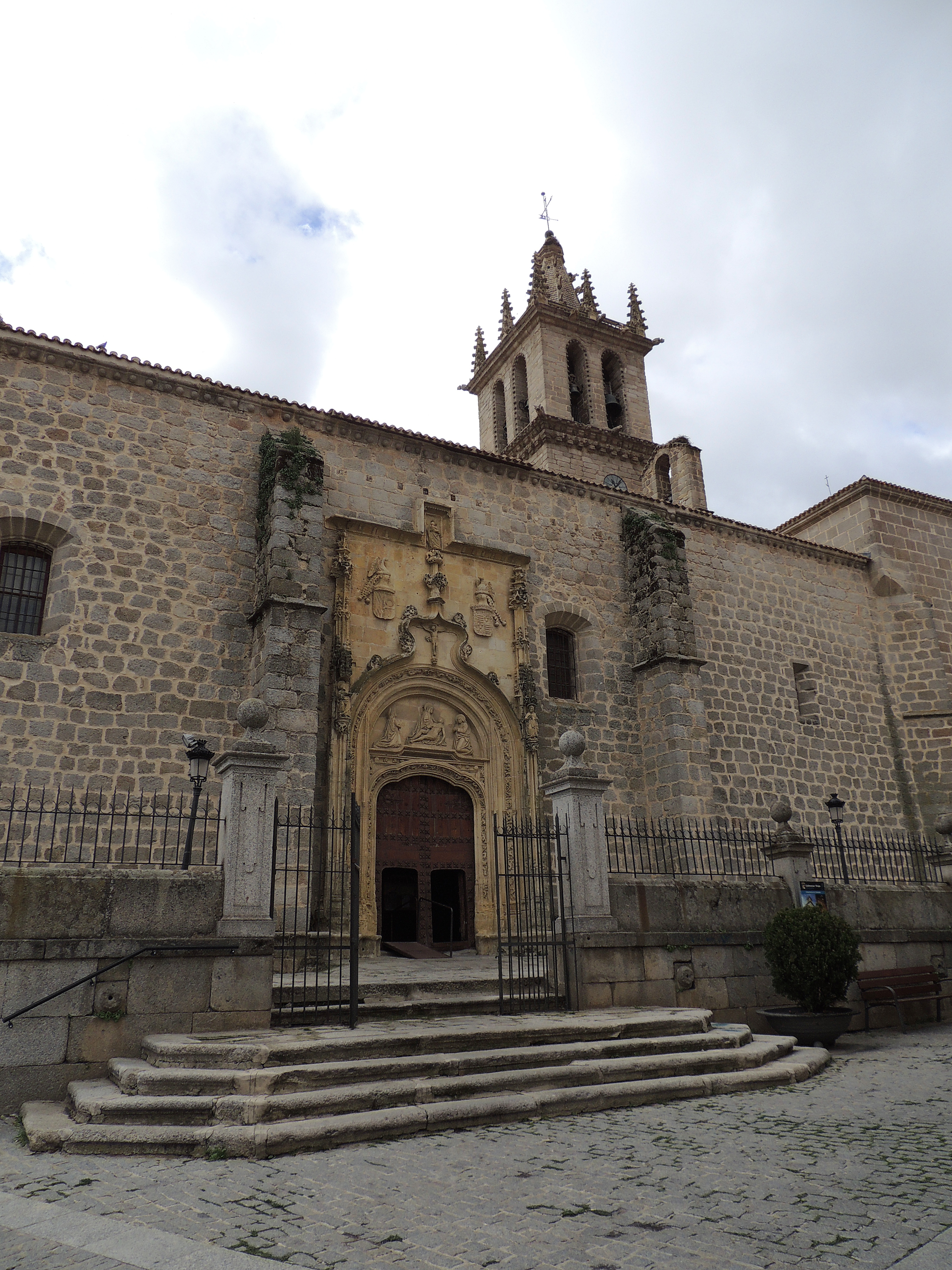 Exterior de la basílica de Colmenar Viejo